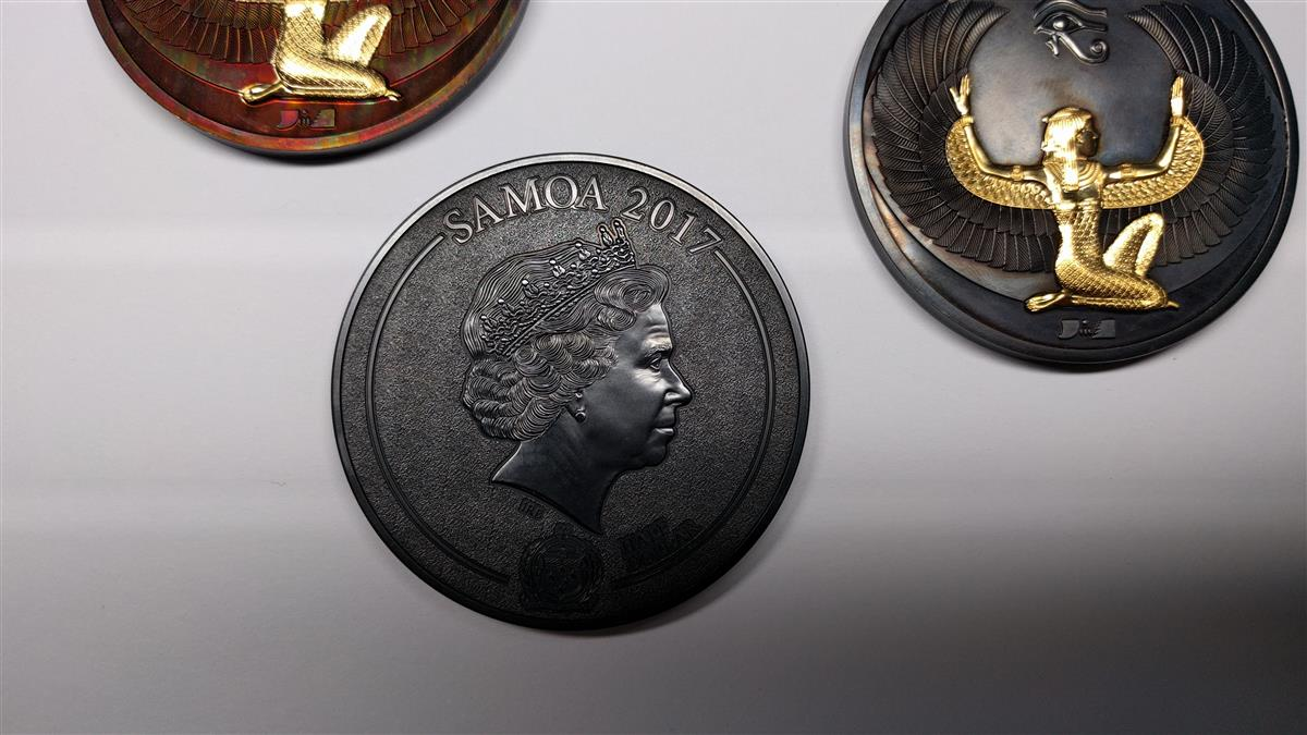 Die Namensnennung umfasst minimal die Angabe "Markus Eckardt 2017, mokume-saar.de". Ansonsten gilt die Creative-Commons-Lizenz „Namensnennung 4.0 international“. Siehe hierzu die Angabe auf